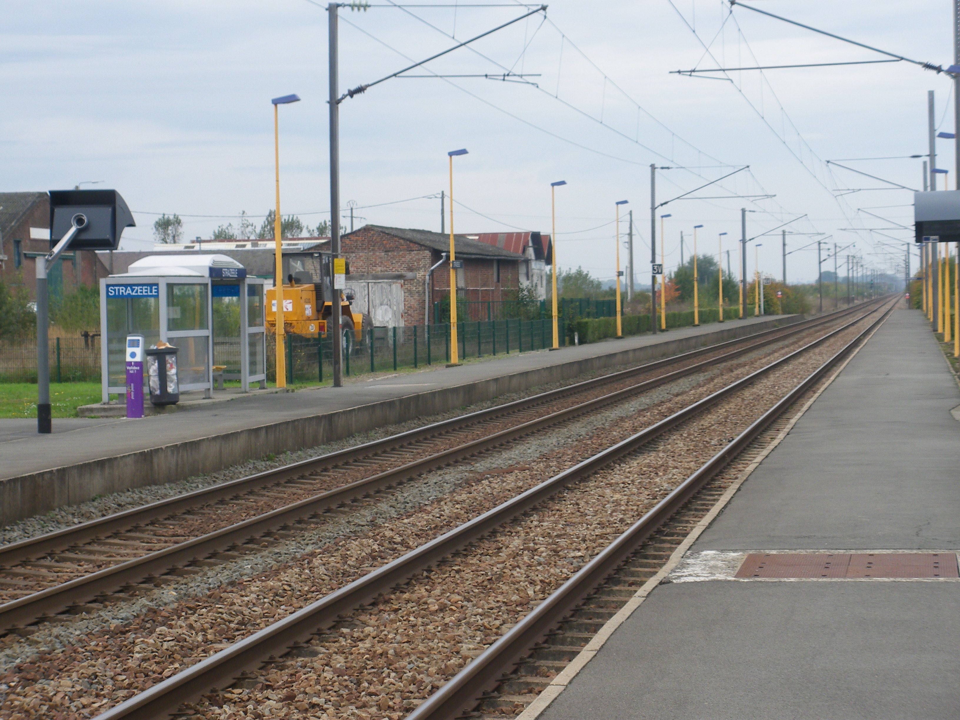 Vue de la gare de Strazeele.